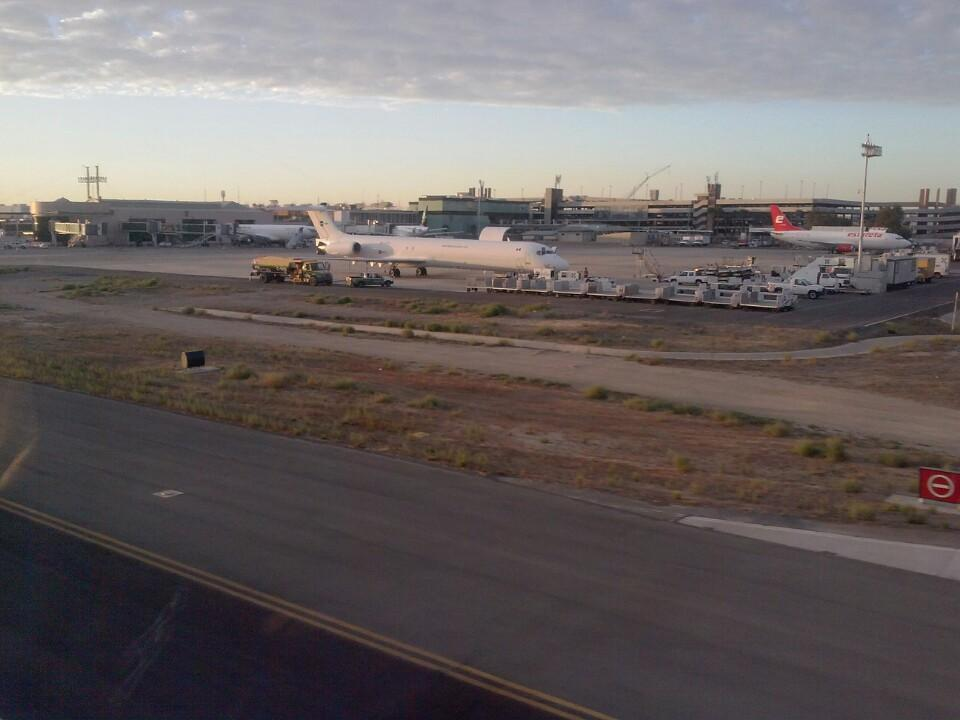 plataforma de carga del aeropuerto